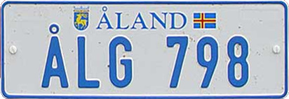 Aalands license plate